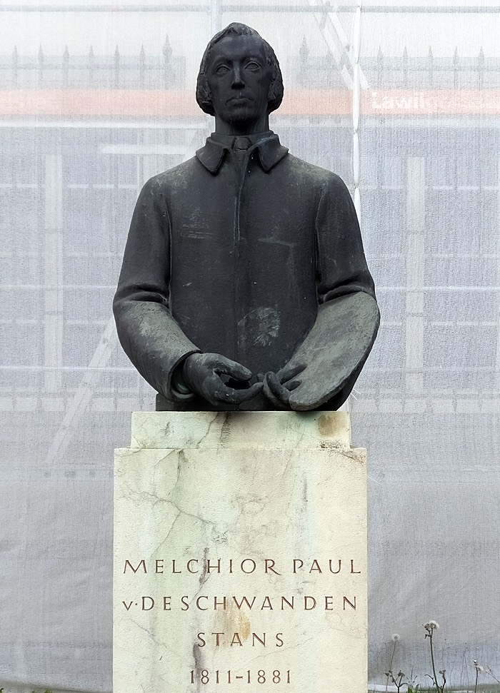 Denkmal von Melchior Paul Deschwanden in Stans NW